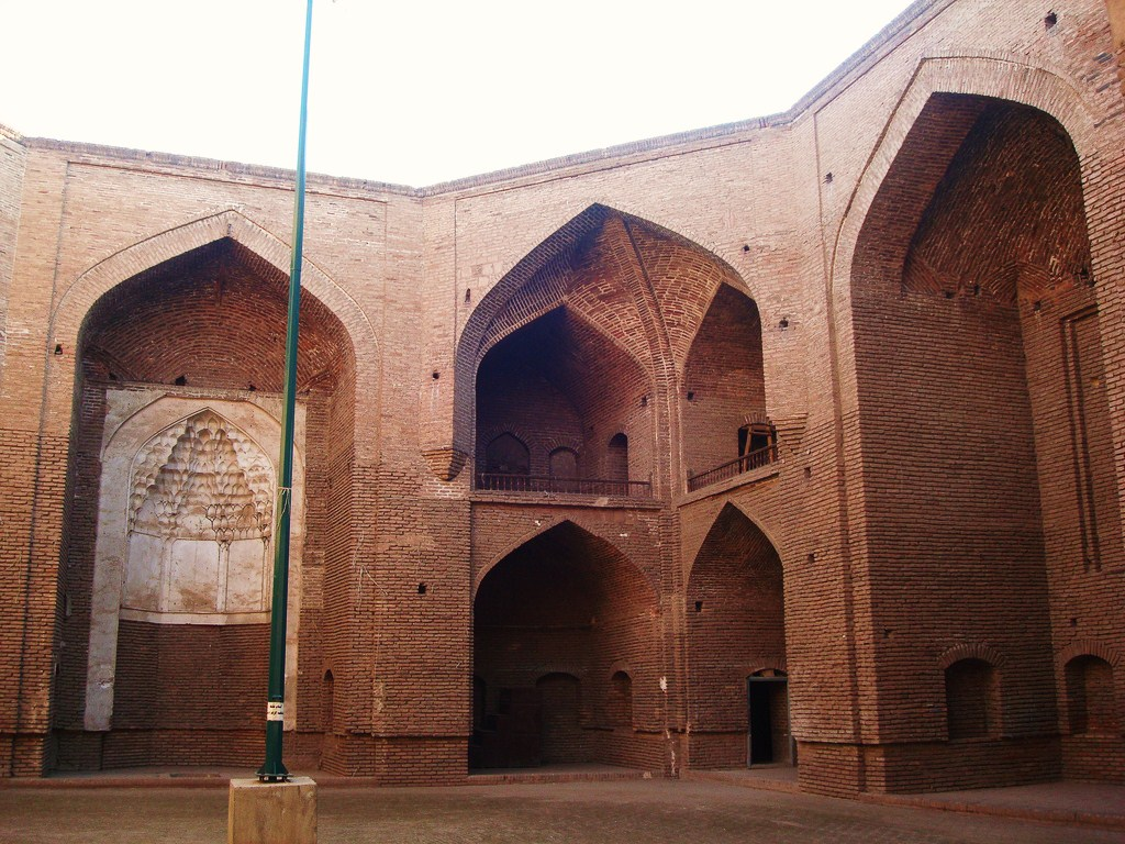 مسجد مطلب خان.خوی